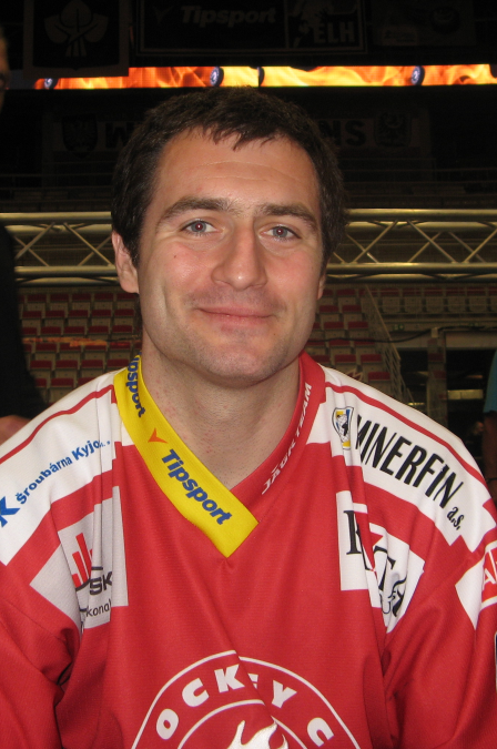 Po zakončení sezóny 2014/15 ve Werk Areně